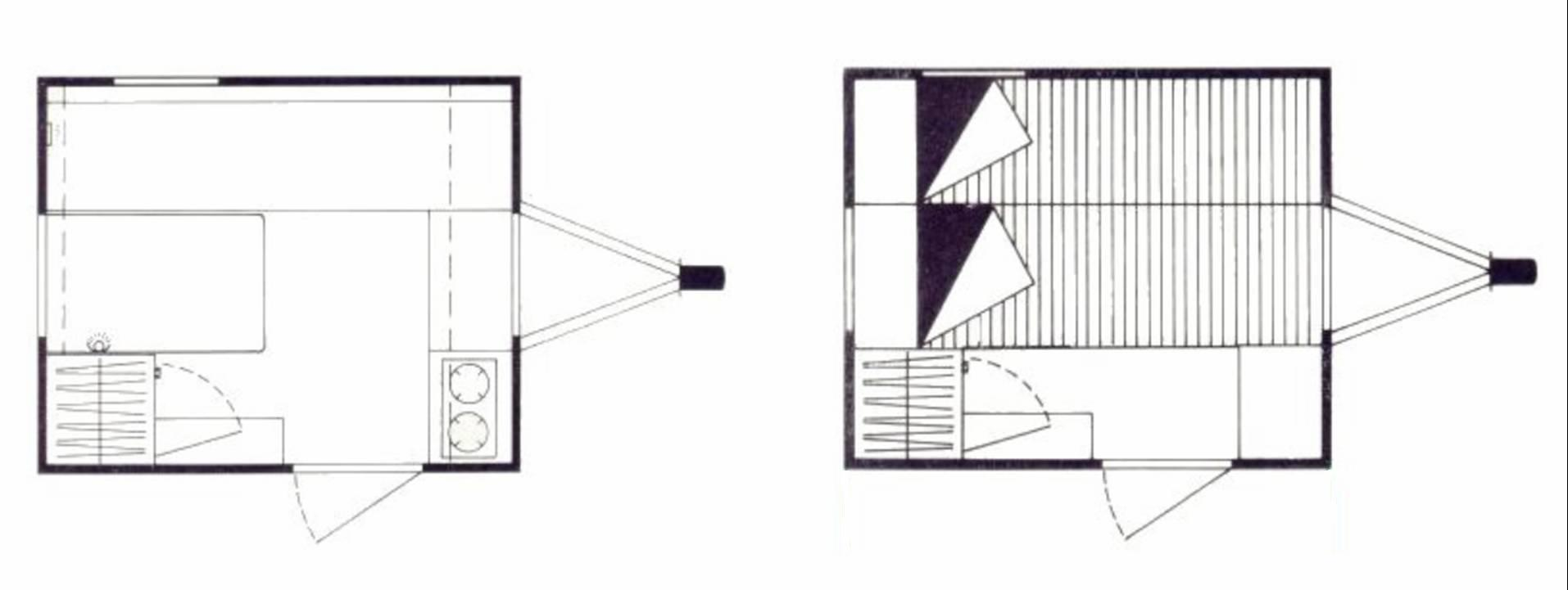 schematische Darstellung des Innenraumes des Weferlinger Wohnwagens LC9-200